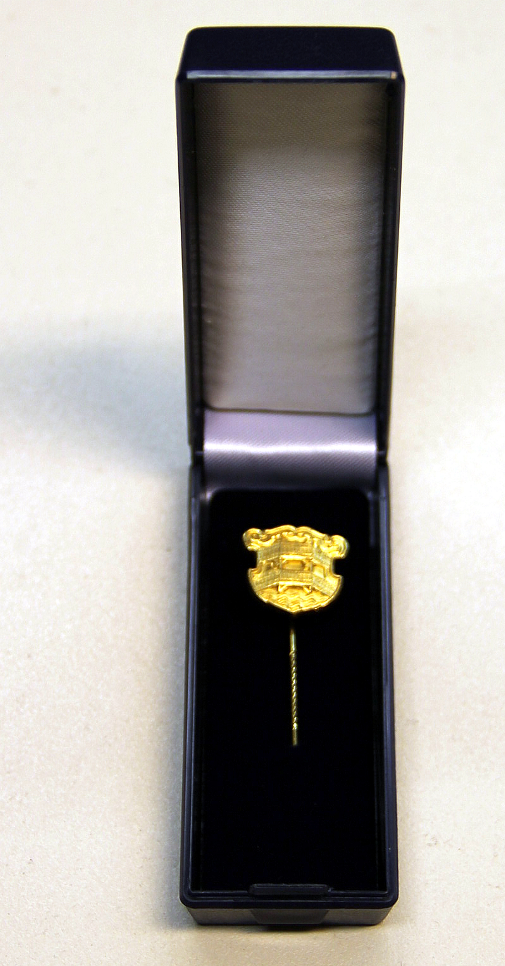 Goldene Brückenehrennadel der Stadt Aue (Sachsen)